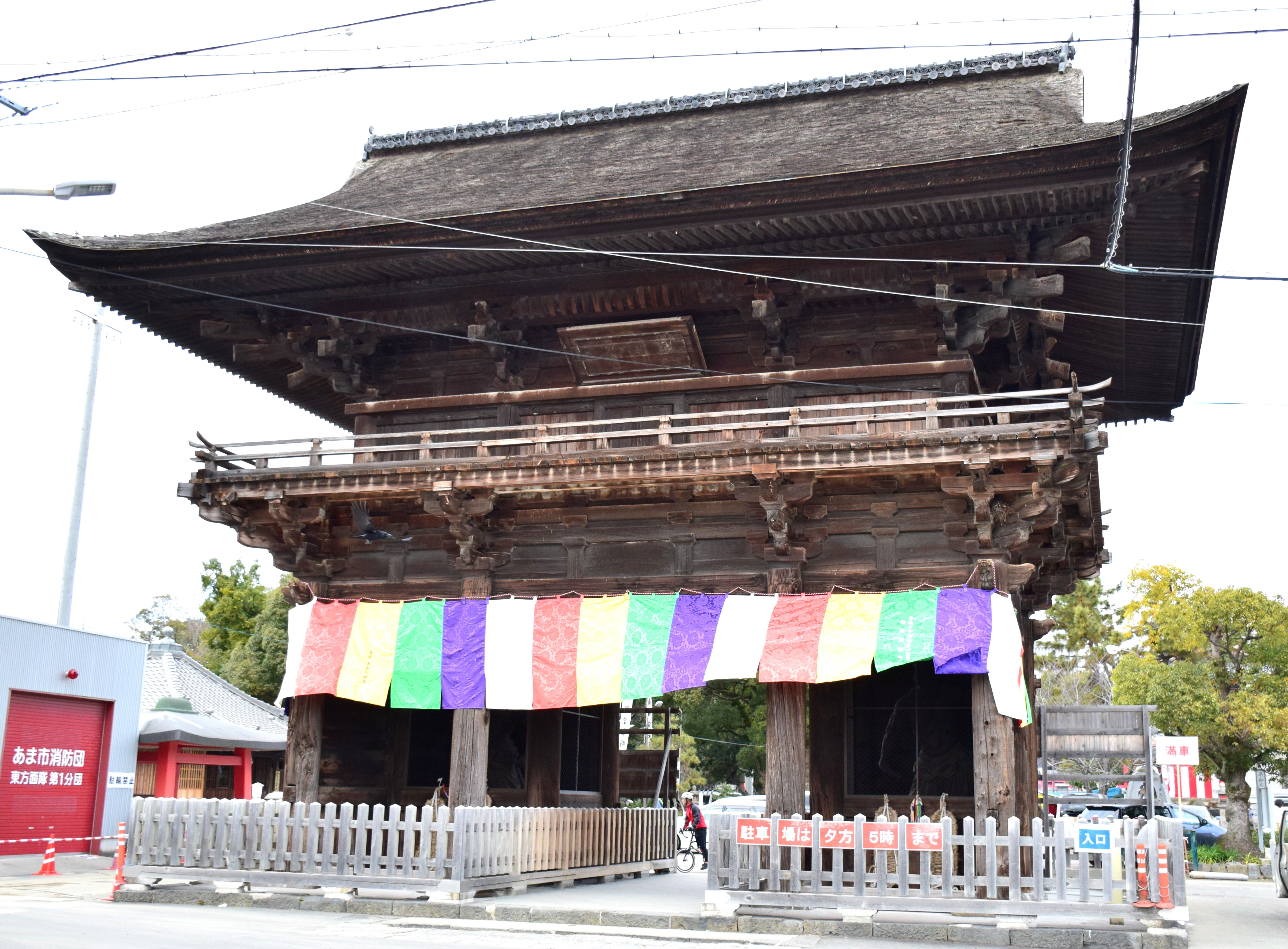 甚目寺仁王門